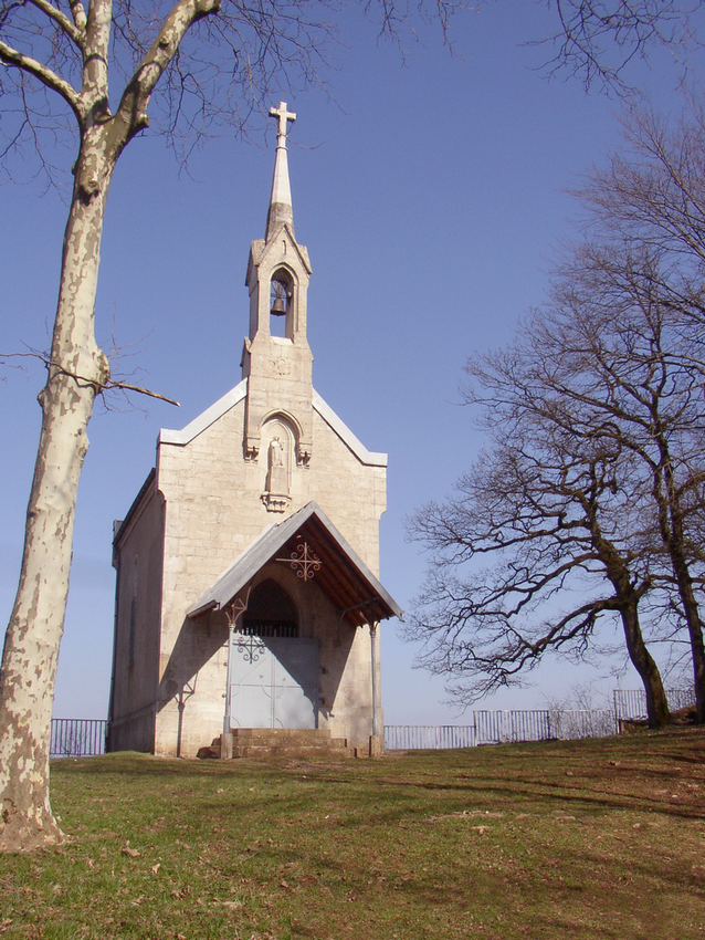 Chapelle de Thoraise (25)